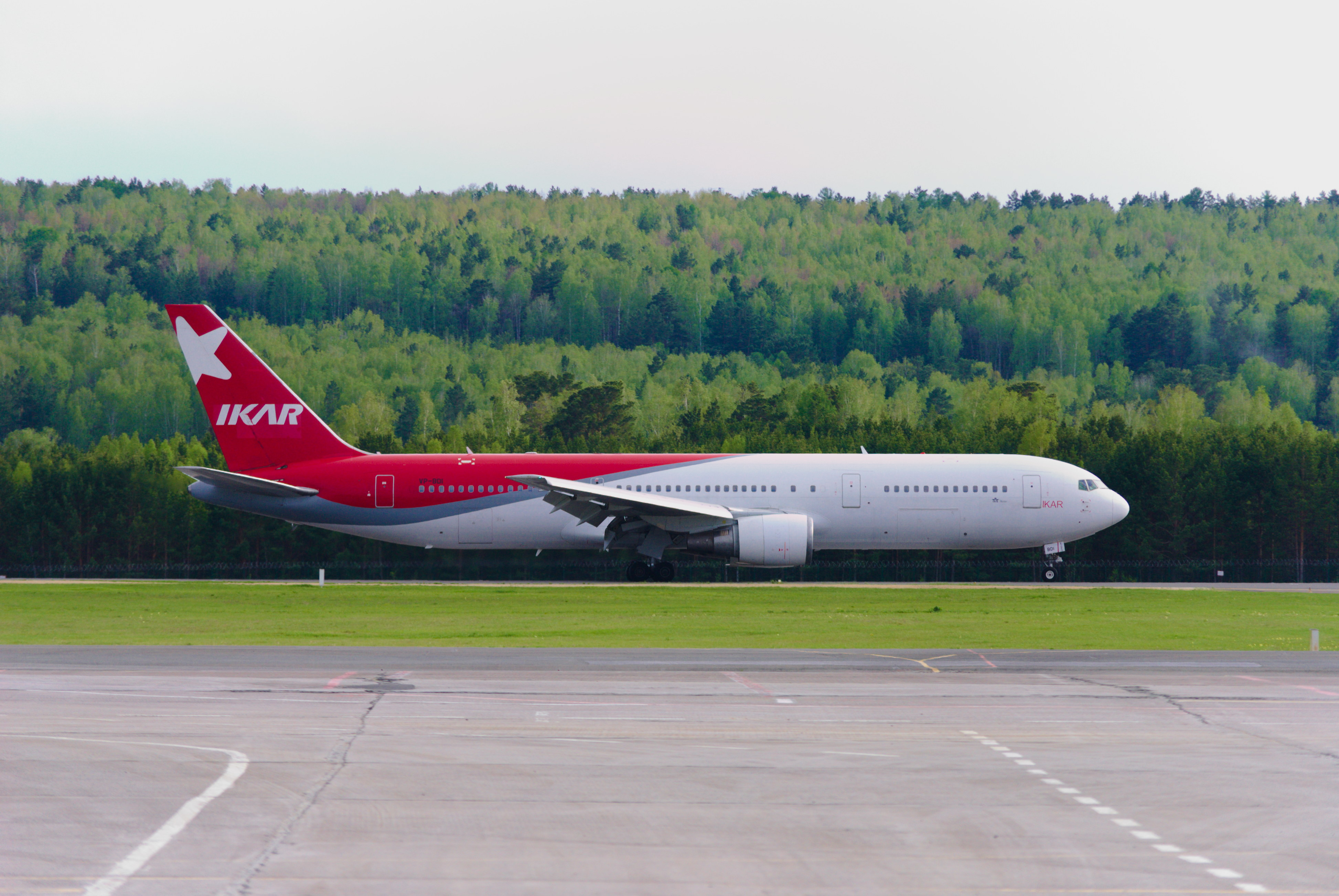 Боинг 767 (VP-BDI) авиакомпании Pegas Fly в аэропорту Красноярска в 2018 году